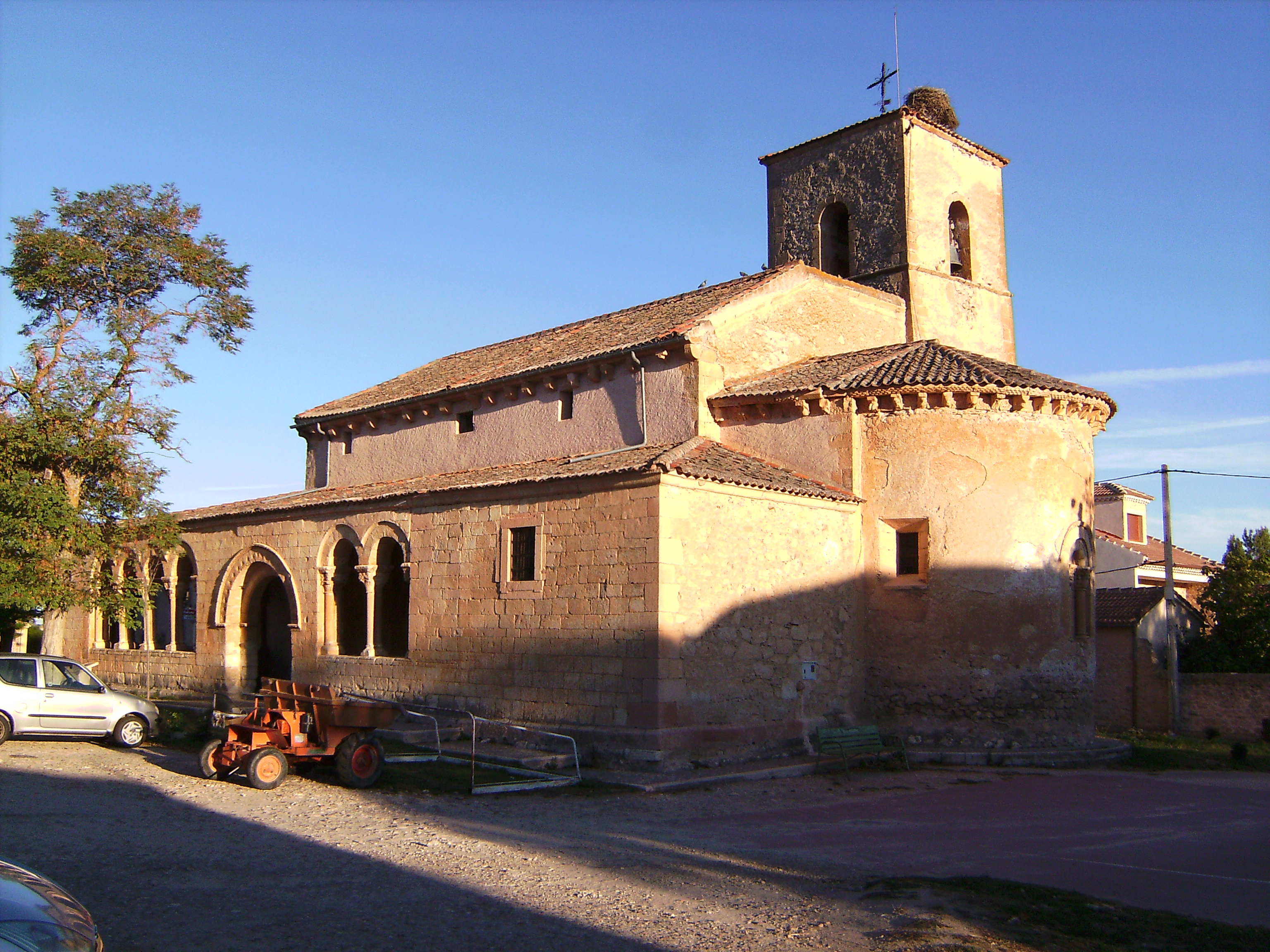 Exterior